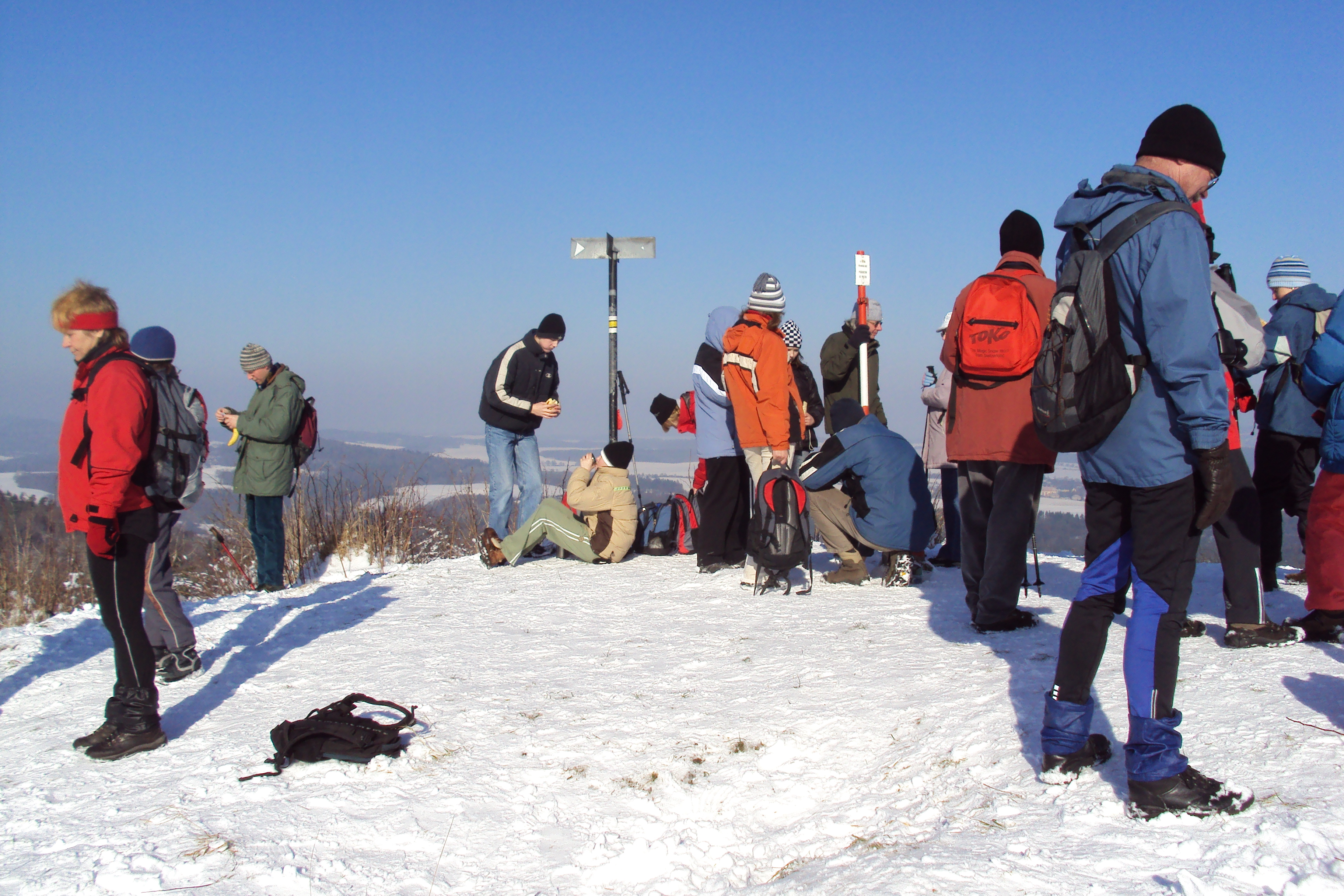 Turistický sraz na vrcholu Nedvězí u Dubé